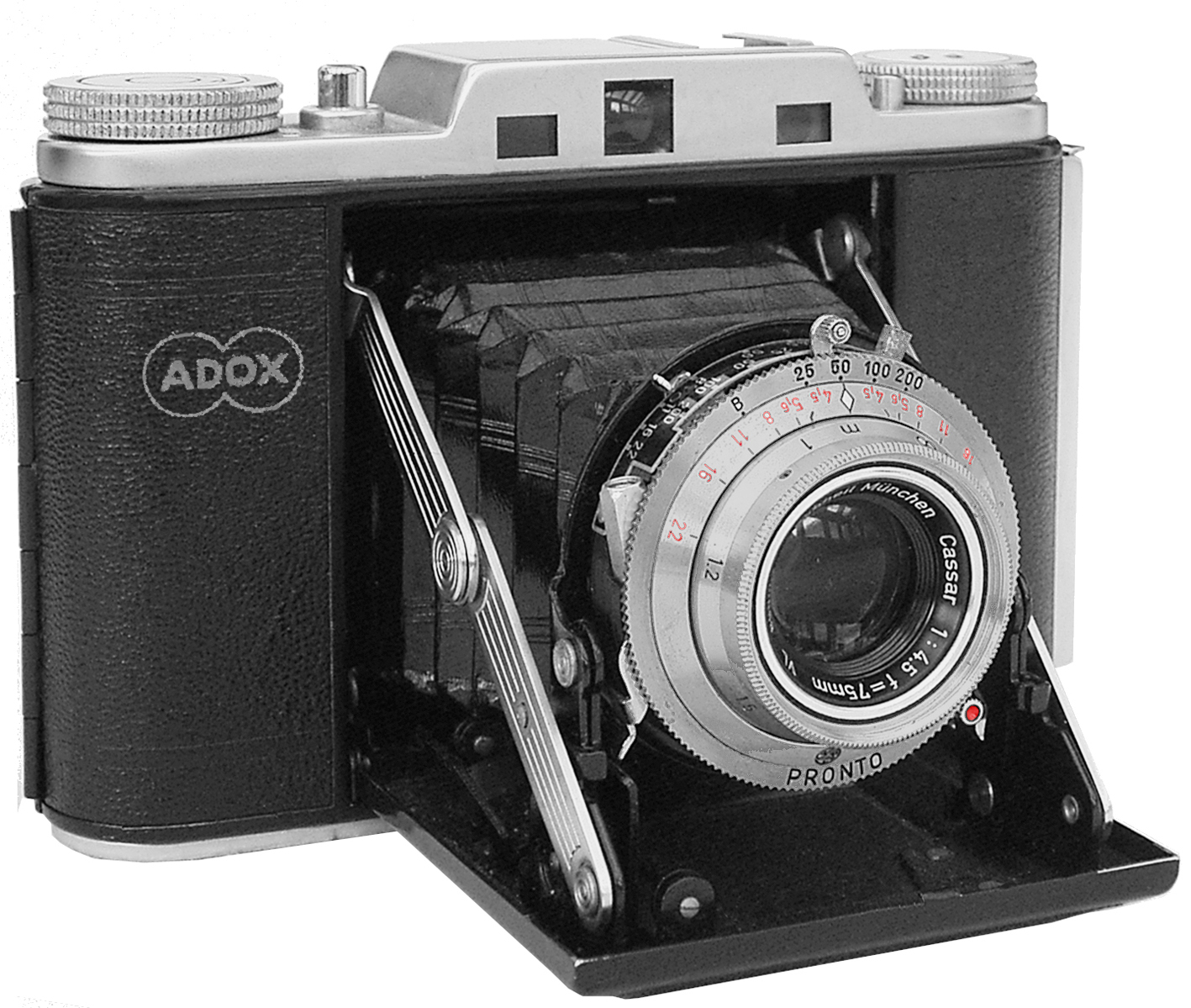 Die Adox Mess-Golf war 1952 die preisgünstigste Entfernungsmesser-Kamera für das 6x6-Format, der Preis betrug 118 DM. Sie ist ausgerüstet mit beledertem Gehäuse, verchromter Entfernungsmesser-Brücke, Gehäuseauslöser, Auslösesperre gegen Doppelbelichtungen, Geräteschuh zum Aufstecken von Belichtungsmesser oder Blitzgeräten und konischer Objektiv-Einstellfassung. Das eingebaute Cassar 4,5/7,5 cm ist vergütet und mit einem Pronto-Verschluss mit synchronisiertem Blitzkontakt und Selbstauslöser versehen.